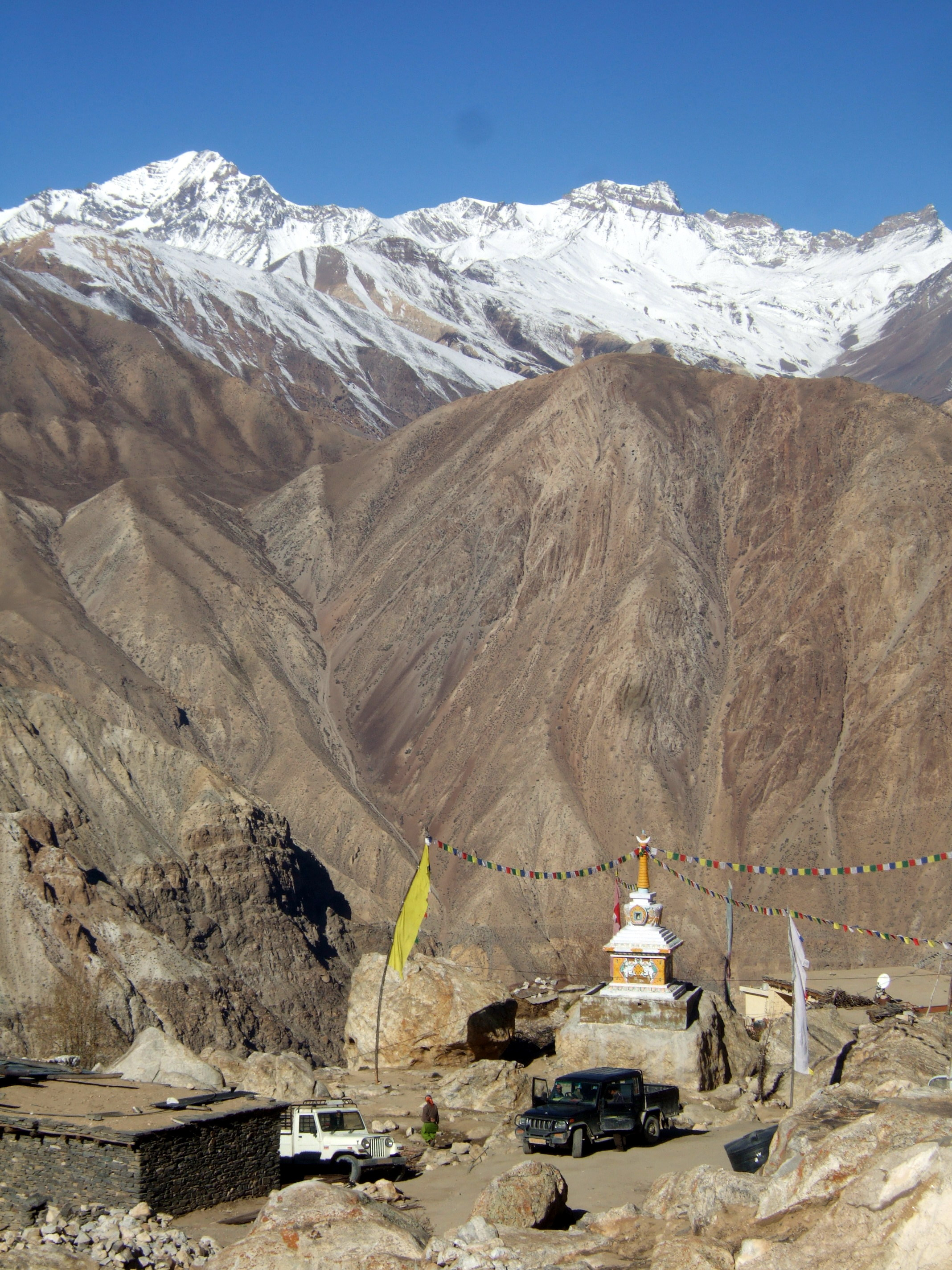 Nako gompa.